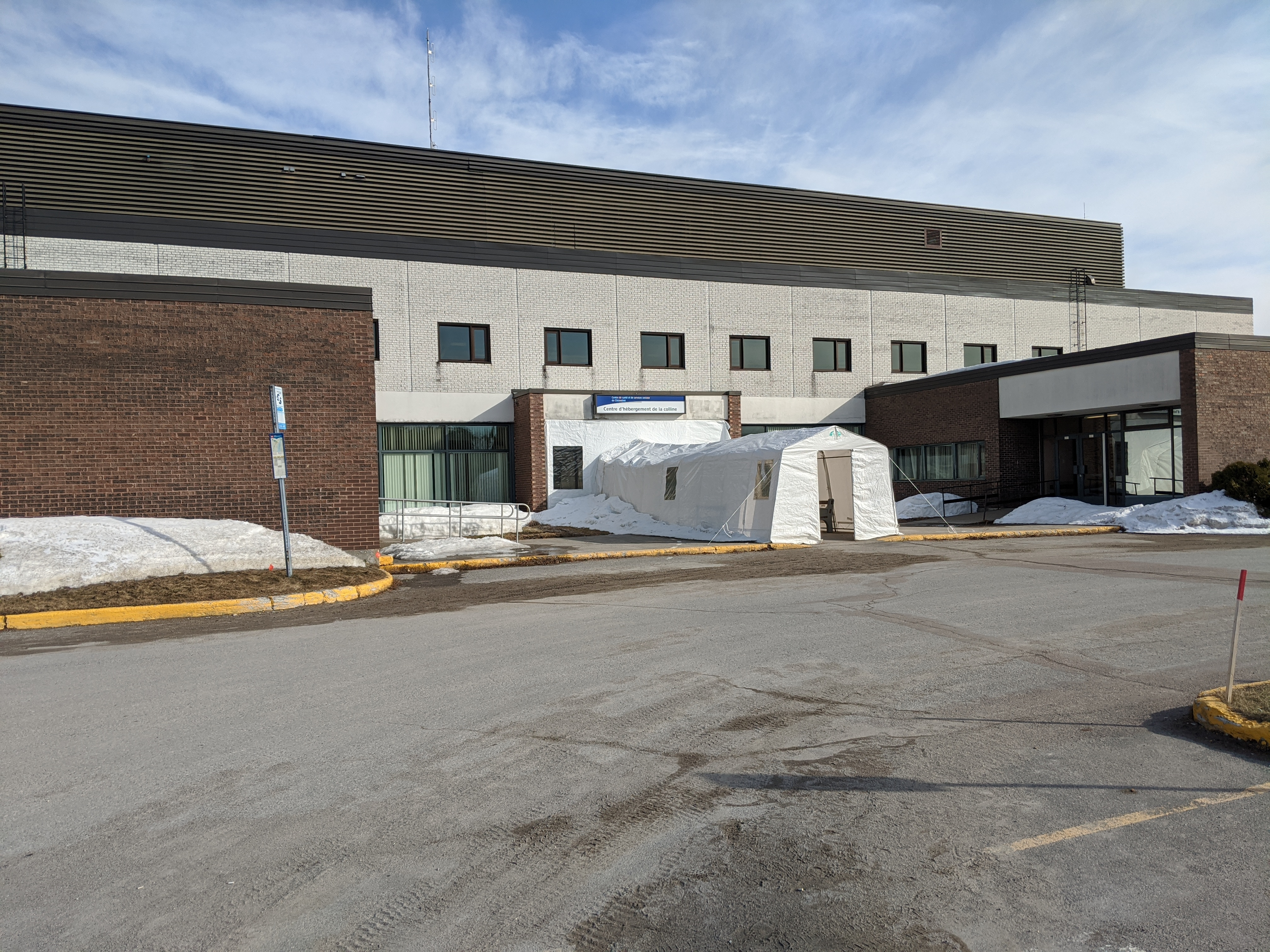 CHSLD de la colline à Chicoutimi-Nord, Québec, Canada.